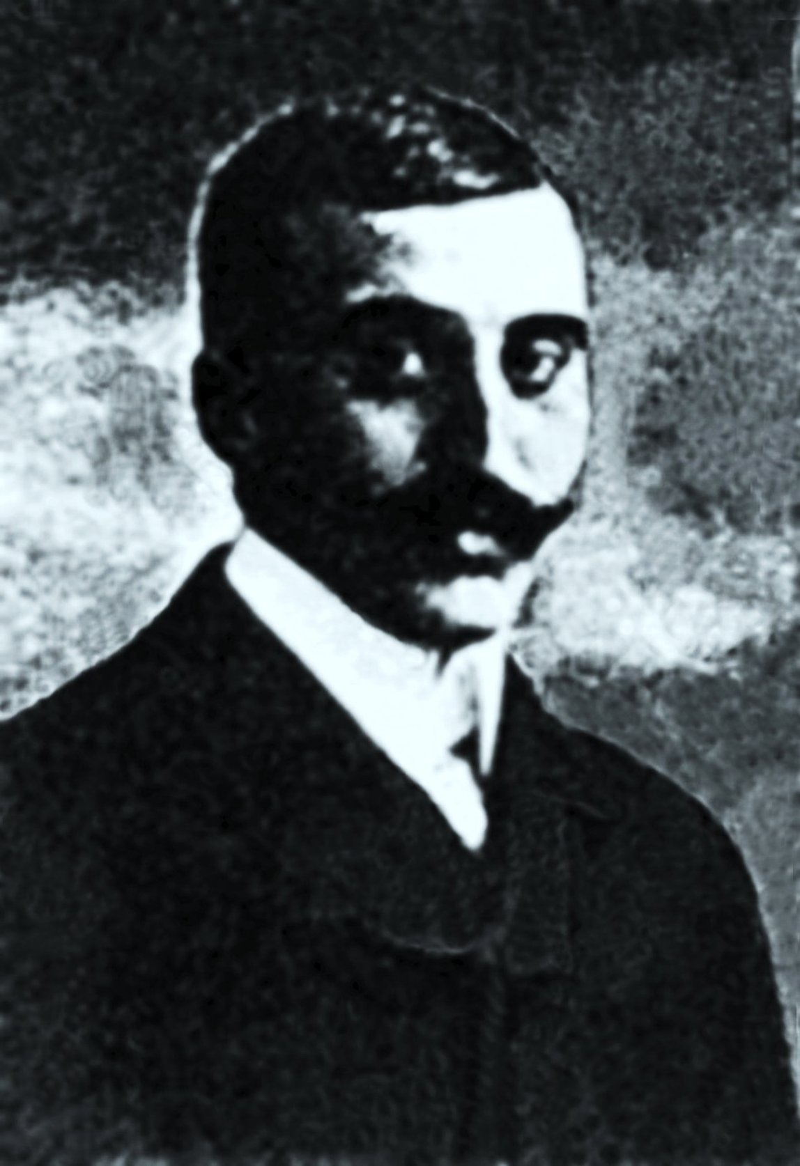 Viktor Graf Wassilko von Serecki 1895